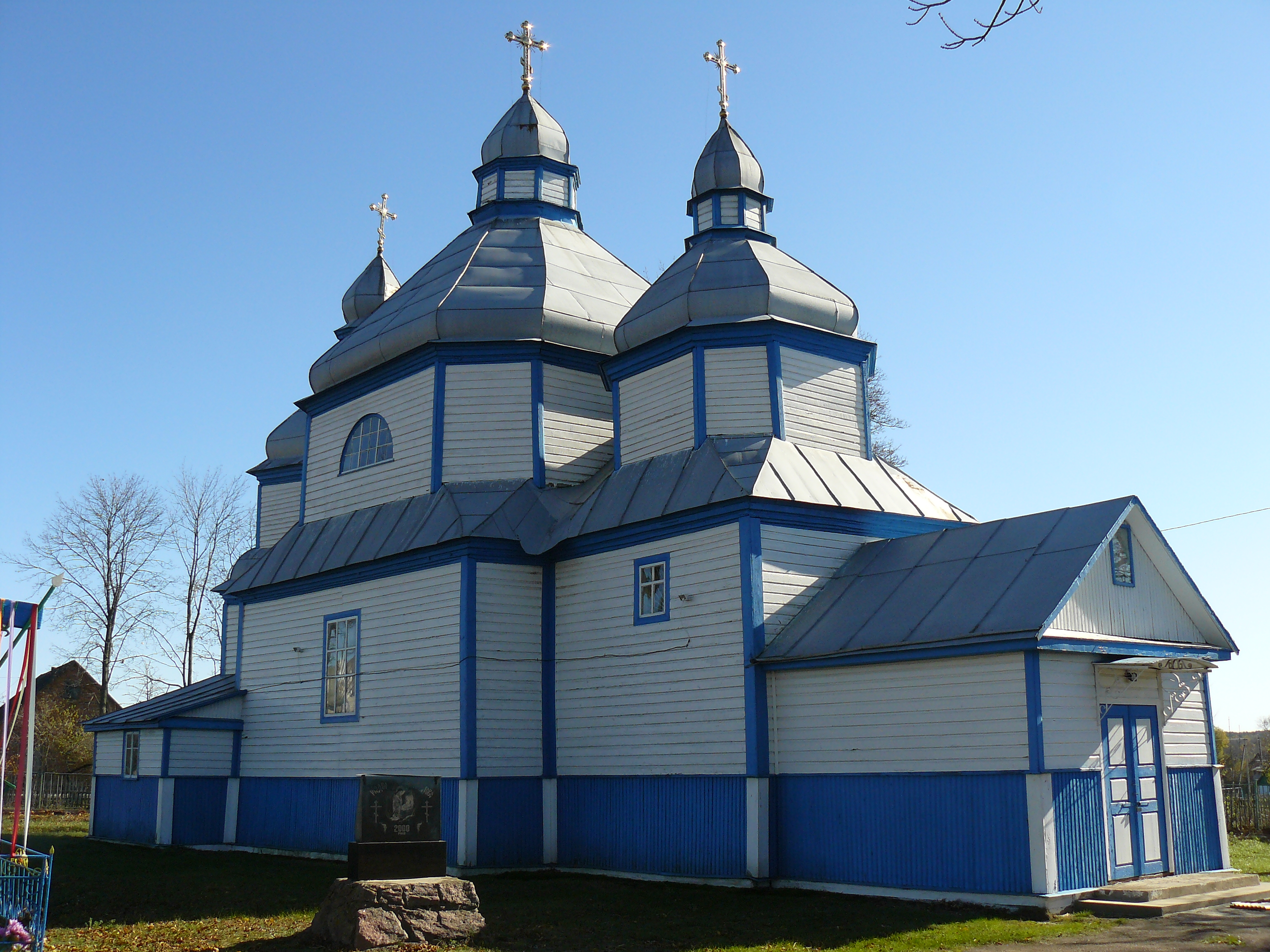 Церква у с. Краївщині Володарськ-Волинського району